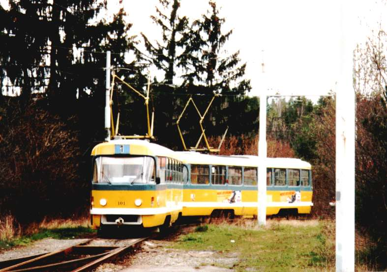 Tramvaj typu Tatra T3 v Plzni